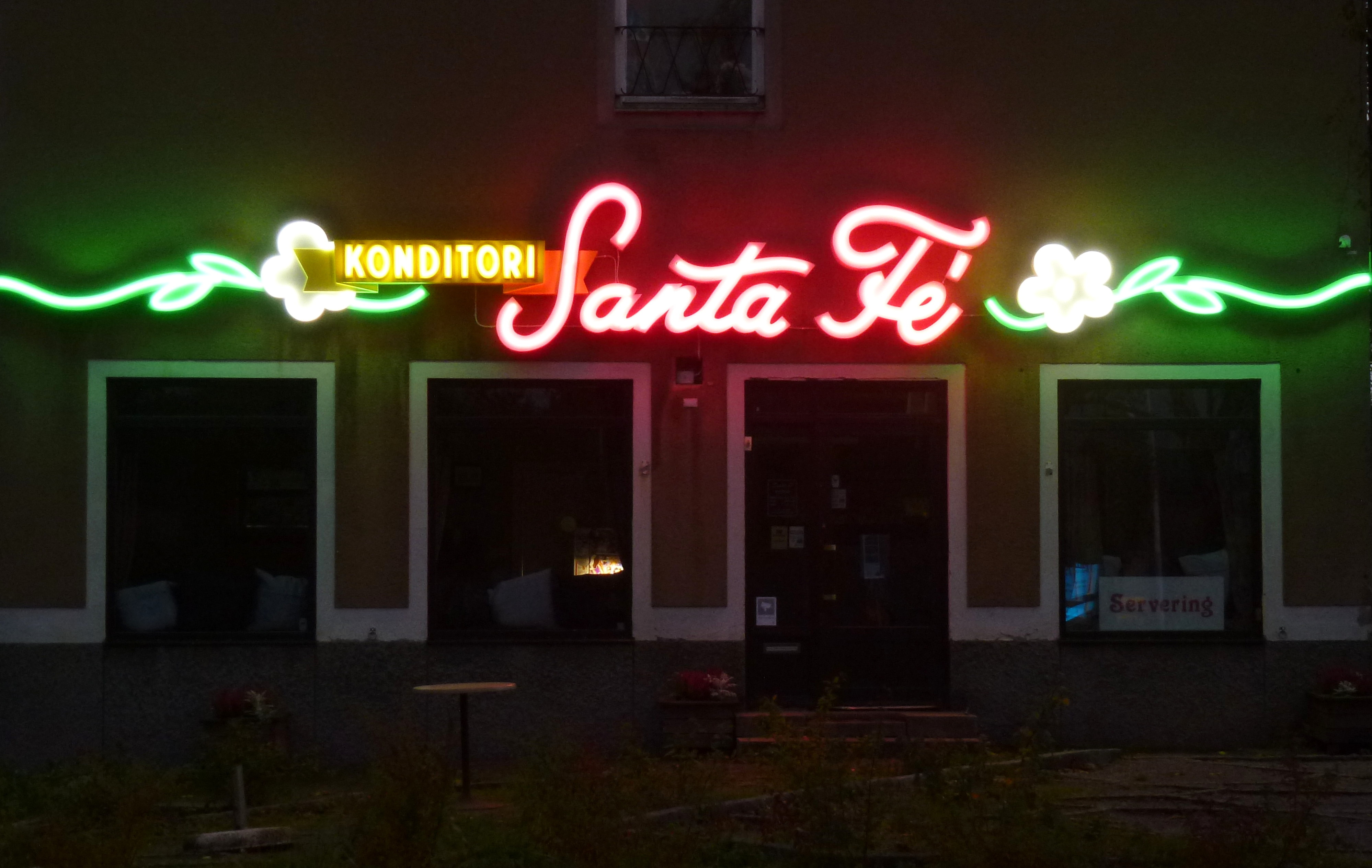 Neonskylt "Konditori Fanta Fé", Kärrtorp